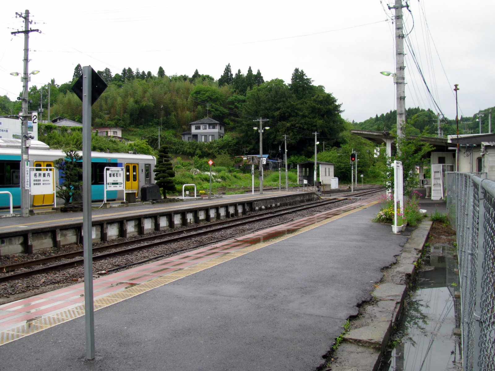 水郡線磐城石川駅